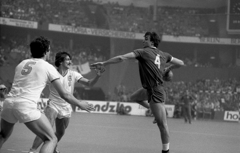 Handballspieler Frank-Michael Wahl bei Torschuss ADN-ZB/Mittelstädt/15.1.83/ Westberlin: Viertelfinal-Rückspiel im IHF-CUP/ Trotz eines 14 : 12 Sieges schied der SC Empor Rostock gegen die Reinickendorfer Füchse aus dem laufenden Wettbewerb, weil das Heimspiel mit 16 : 18 Toren verloren wurde. Empor-Kapitän Frank-Michael Wahl (r.) kann durch Roberto Pries (Nr. 5) und Dieter Nerlich (Nr. 6) nicht am erfolgreichen Torwurf gehindert werden. Abgebildete Personen: Wahl, Frank: Handballspieler, SC Empor Rostock, DDR